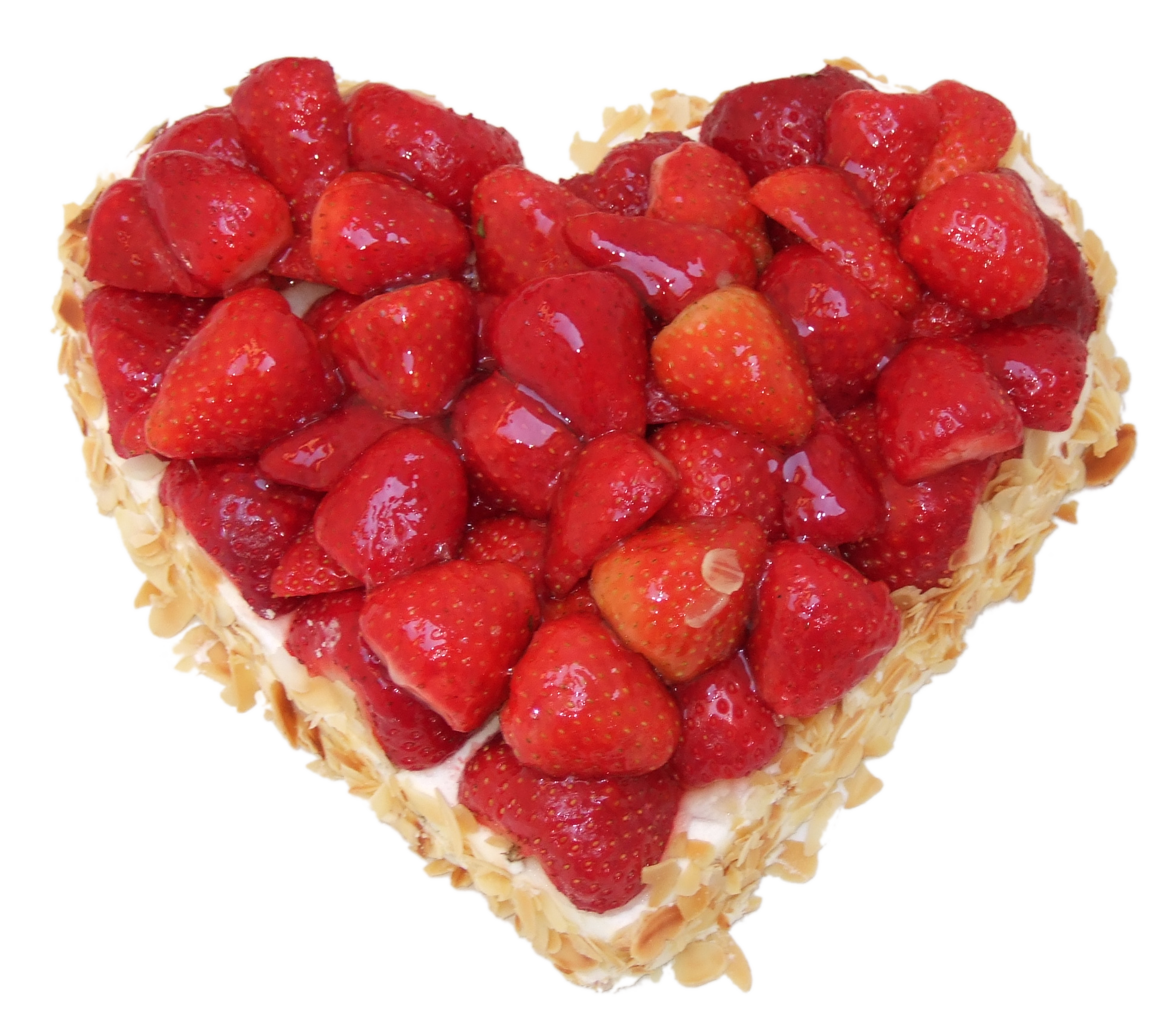 Tarta de fresas en forma de corazón